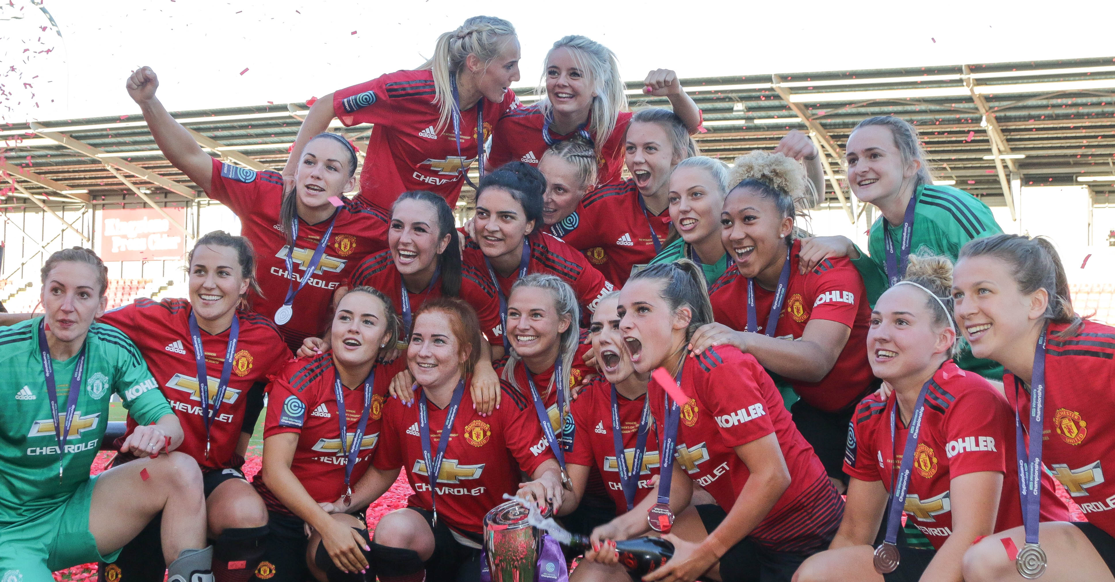 Man Utd Women 5 Lewes FC Women 0 11 05 2019-701.jpg